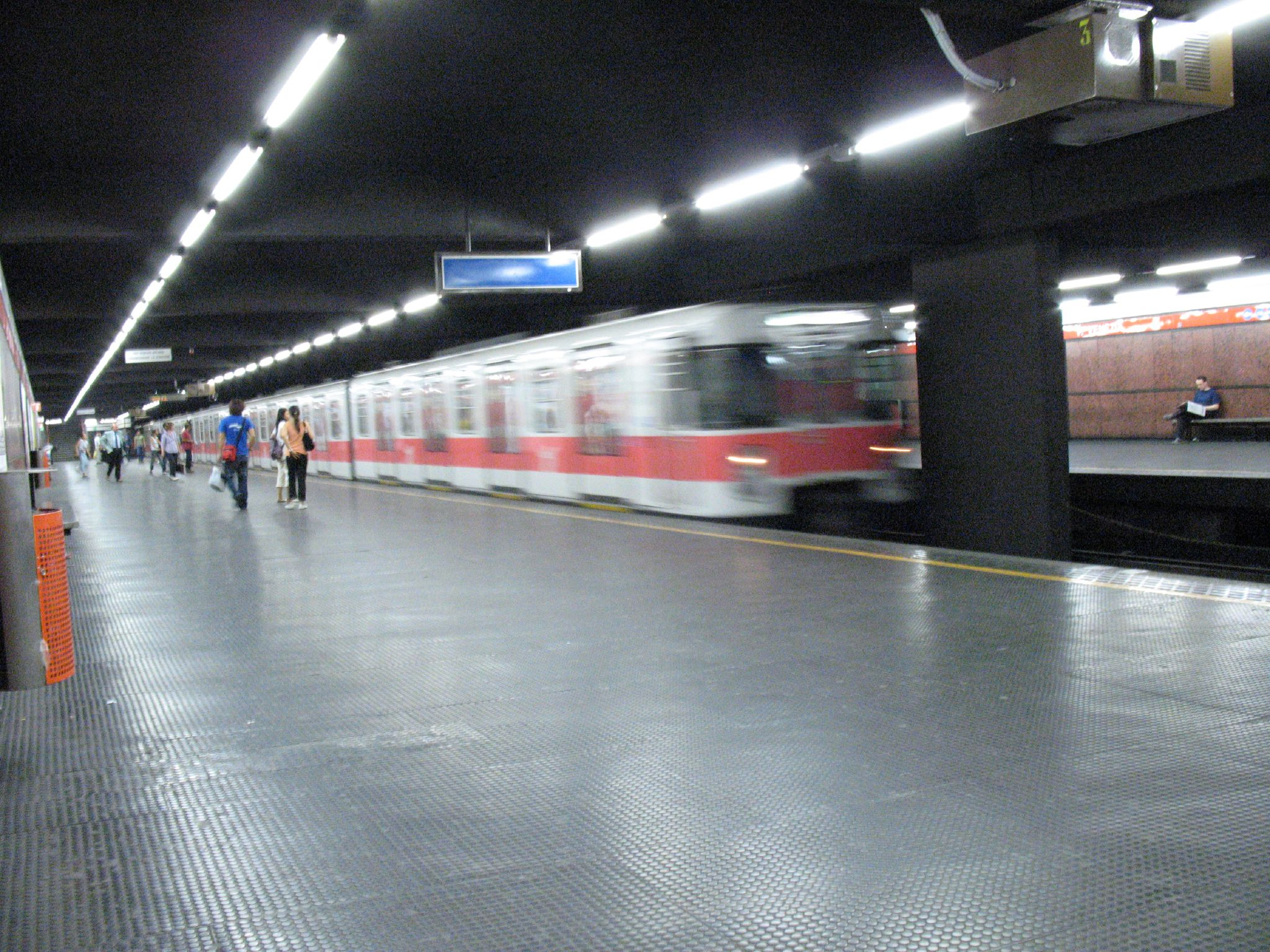 Fermata della metropolitana di Porta Venezia, a Milano